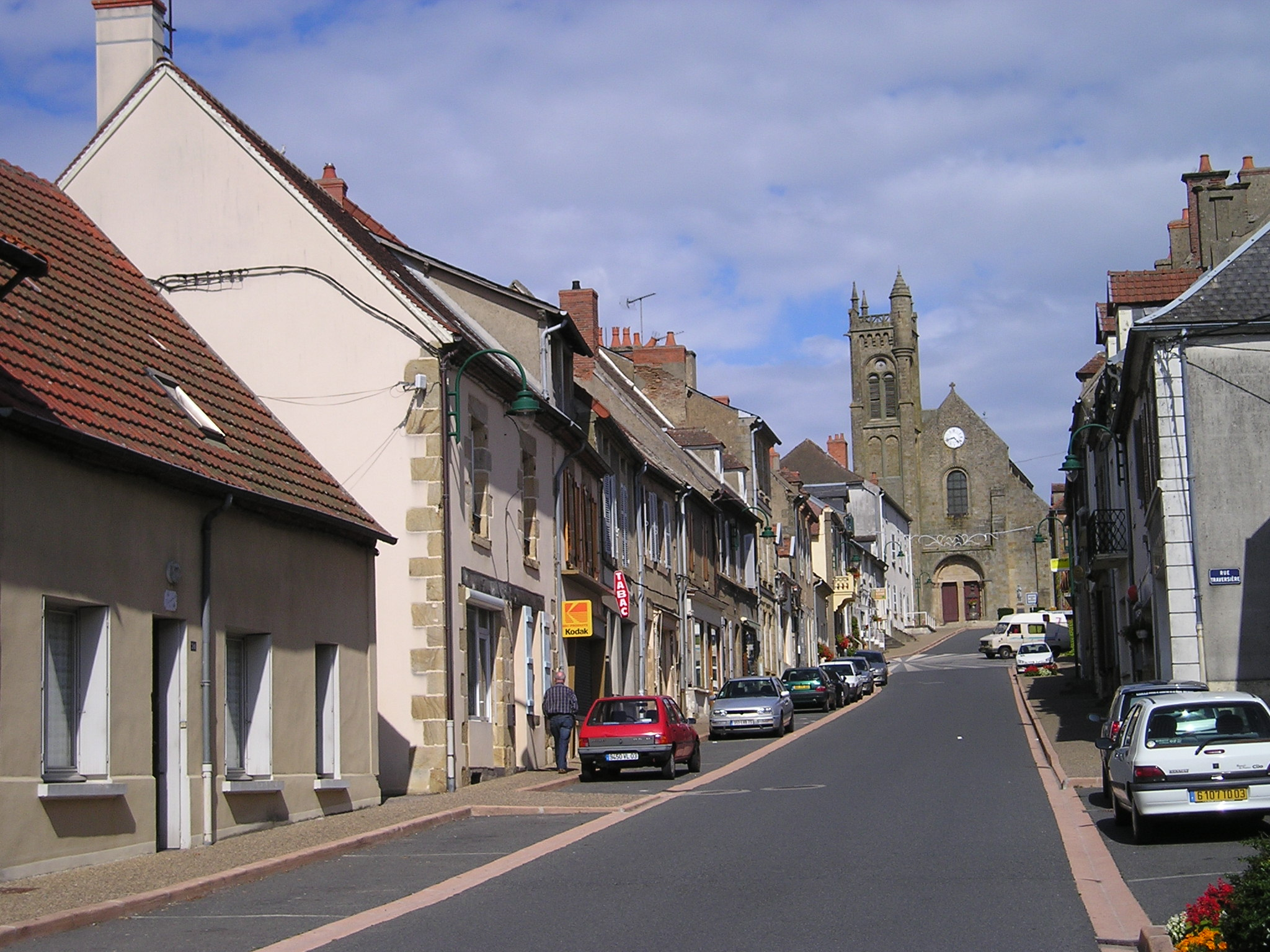 Le Montet (Allier)